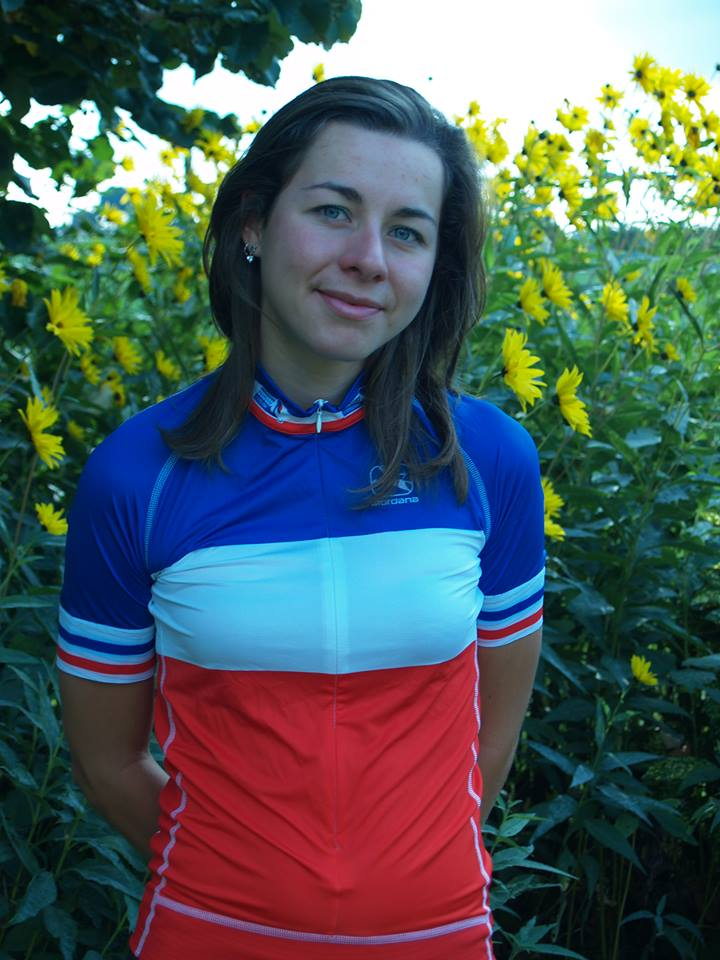 Elise Delzenne en 2013